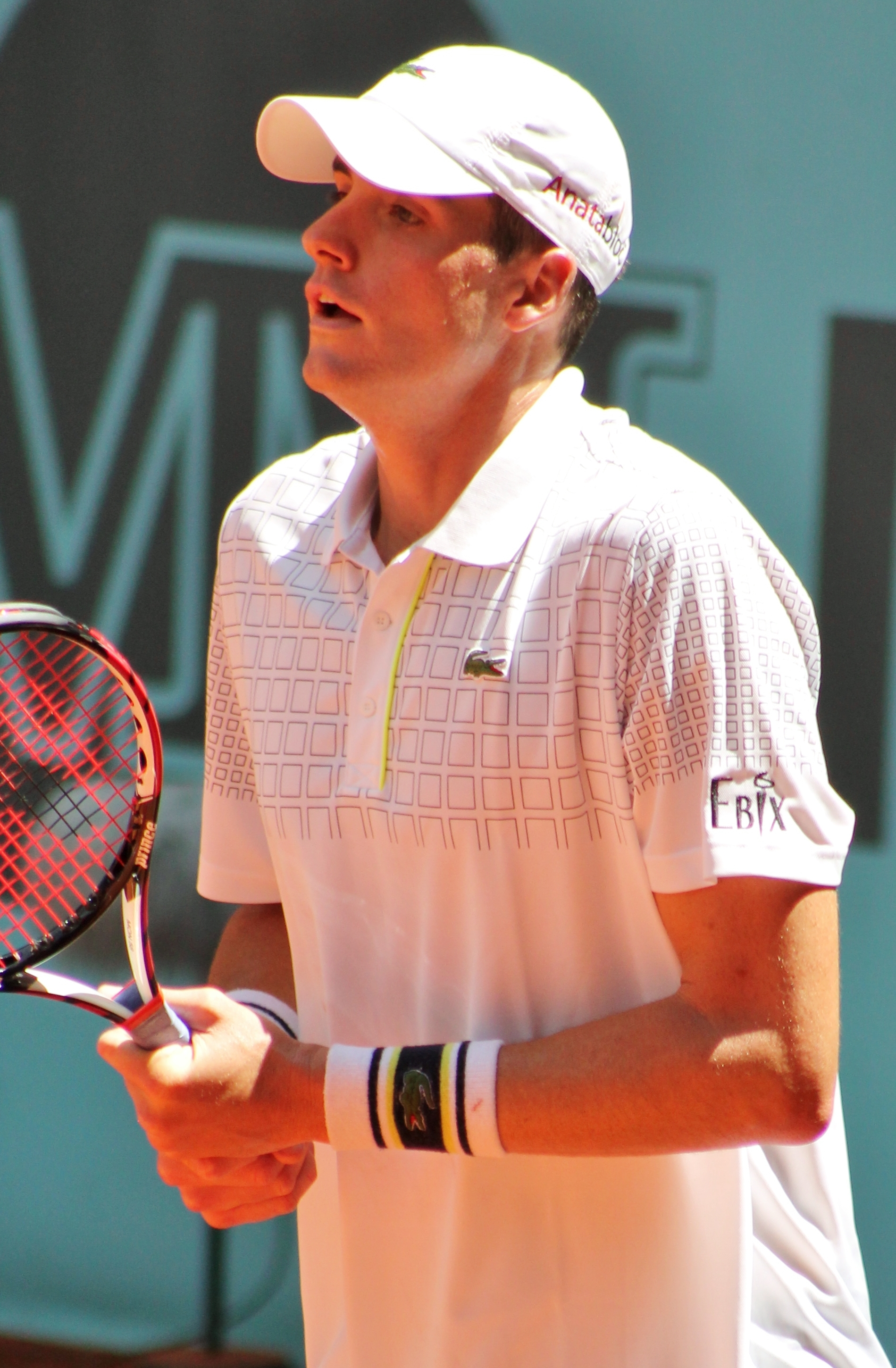 Isner MA14 (22)